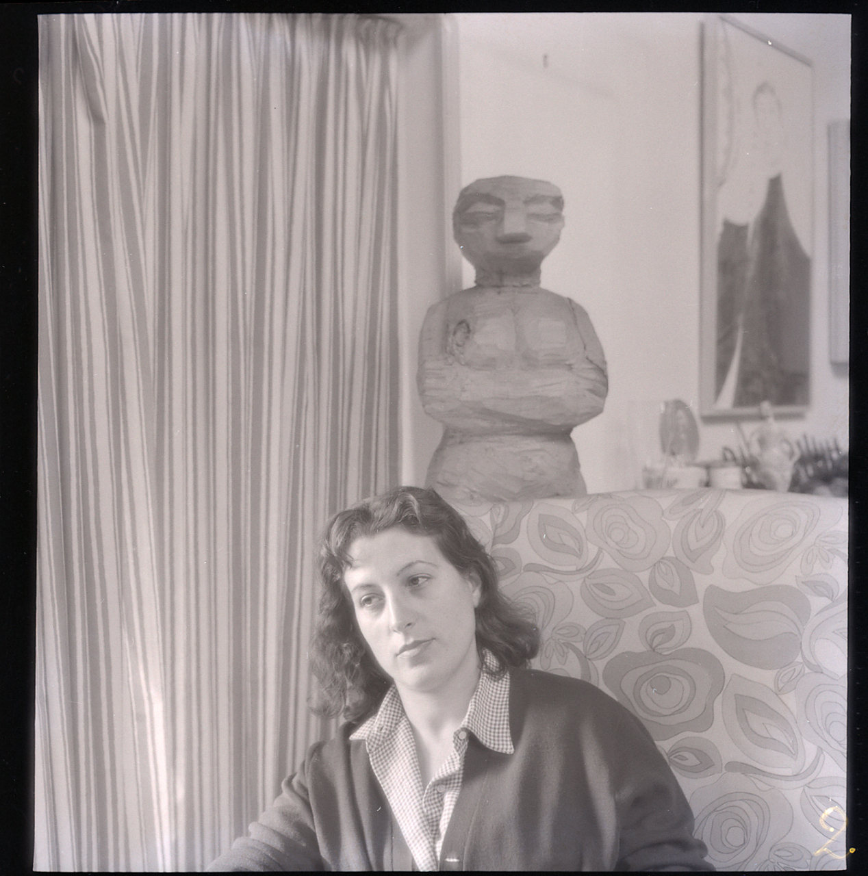 Servizio fotografico : Italia, 1963 / Paolo Monti. - Buste: 13, Fototipi: 13 : Negativo b/n, gelatina bromuro d'argento/ pellicola ; 6x6. - ((Serie costituita da 13 buste di negativi identificati con una doppia numerazione: 4907 (2), 4908 (8), 4909 (7), 4910 (10), 4911 (13), 4912 (14), 4913 (16), 4914 (19), 4915 (20), 4916, 4917, 4918, 4919, e tenute insieme da una graffetta. - Sulla busta identificata con il n. 4907 iscrizione didascalica manoscritta a pennarello: "Milena"; iscrizione documentaria manoscritta a pennarello: "vedi/ 10206".